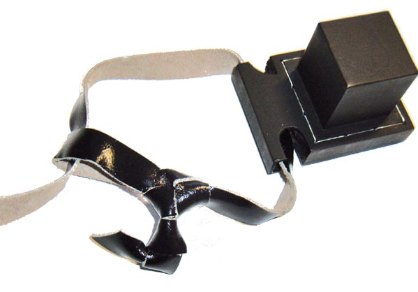 Tfilin shel yad